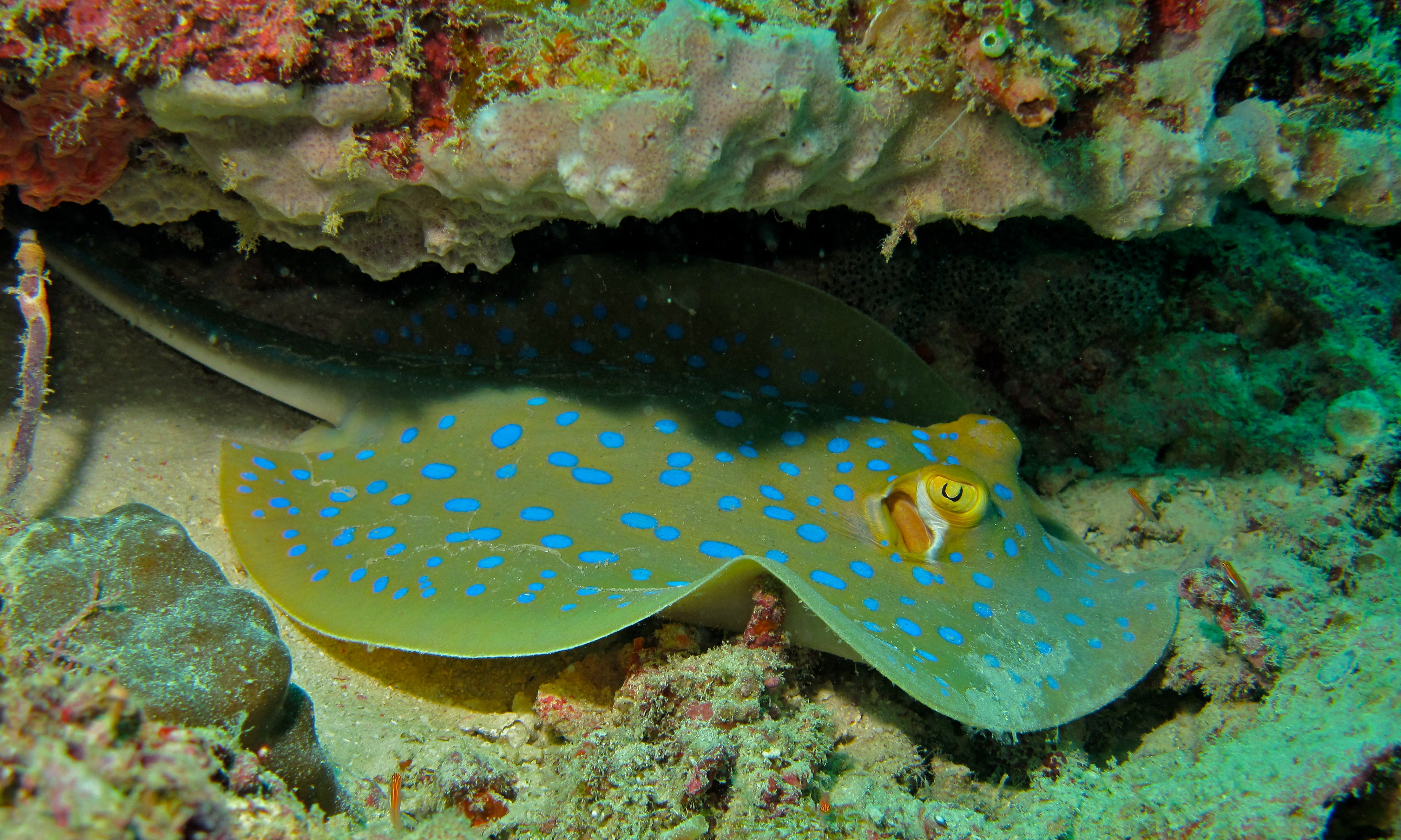 Eel Garden, Pulau Mabul, Sabah, MALAYSIA